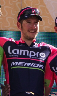 Sacha Modolo en el Tour de San Luis 2014.